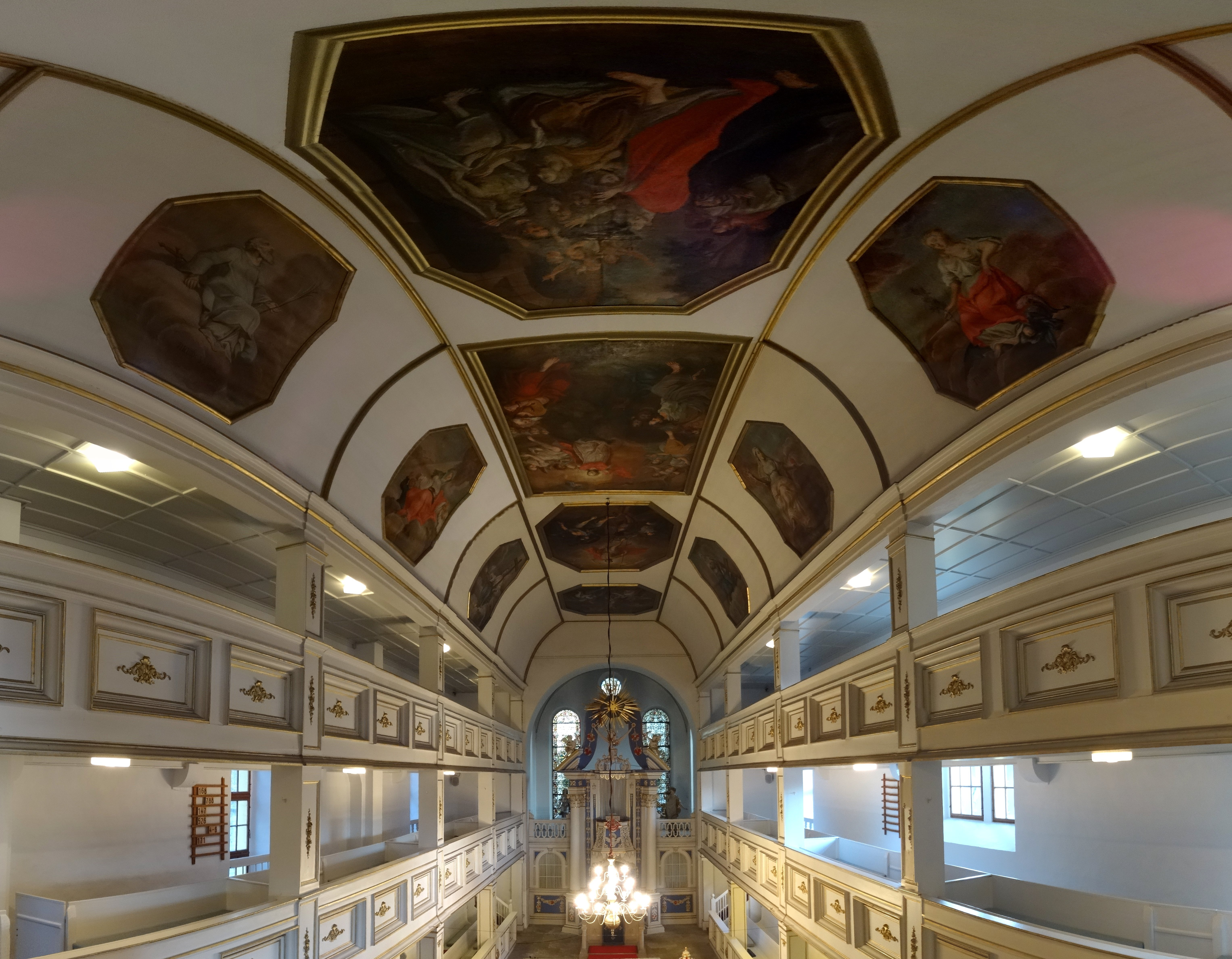 Blick von der Orgel-Empore. Die Kirche ist in den Jahren 1719 bis 1722 entstanden und dem heiligen Leonhard, dem fränkischen Schutzpatron, gewidmet. Um 1750 entstanden die Deckenmalereien des Gothaer Hofmalers Johann Heinrich Ritter. Sie zeigen Szenen der Kreuzigung, des Osterfestes, der Himmelfahrt Christi, der Auferweckung des Lazarus und von König David mit Harfe.